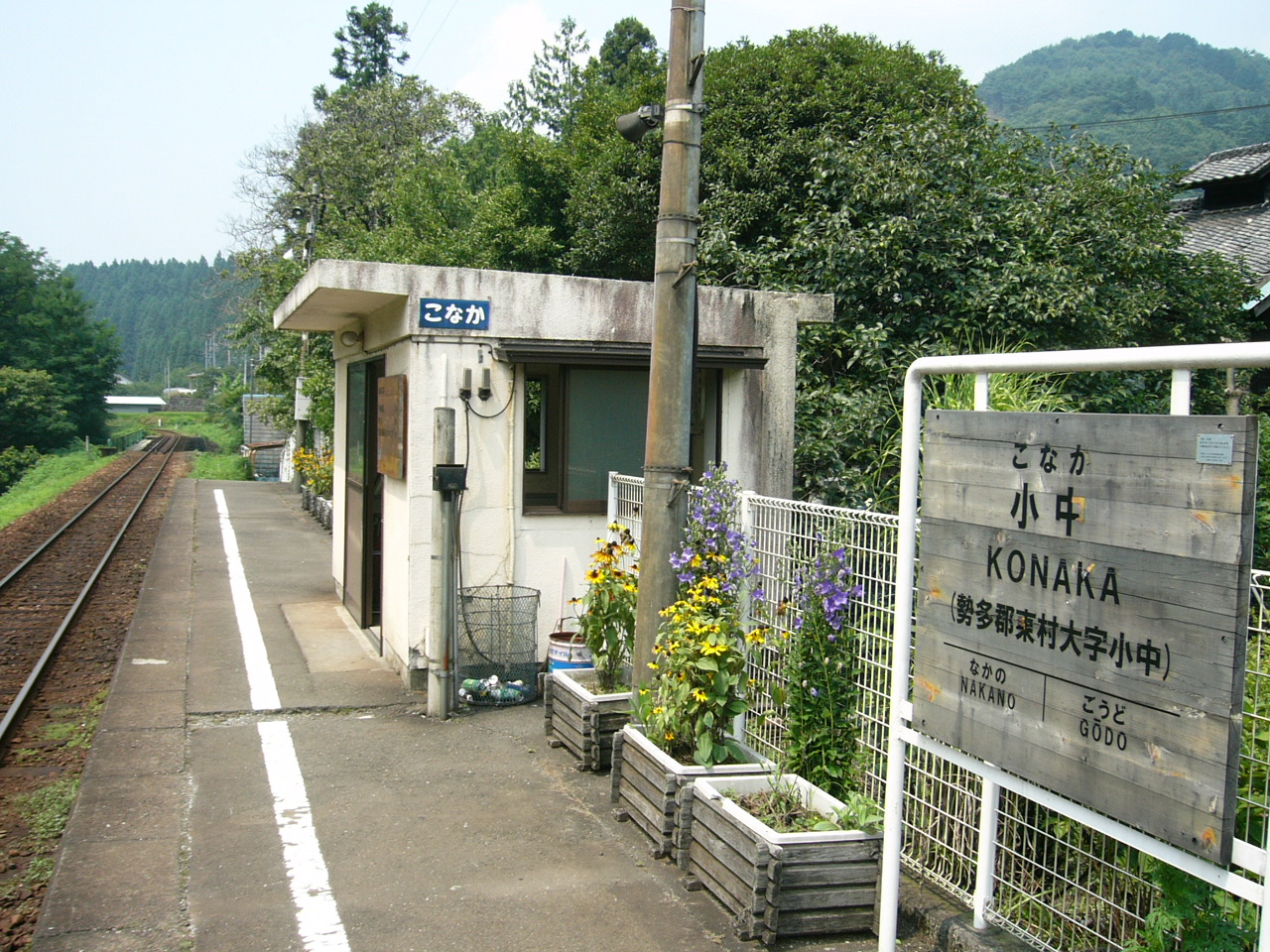 Konaka Station